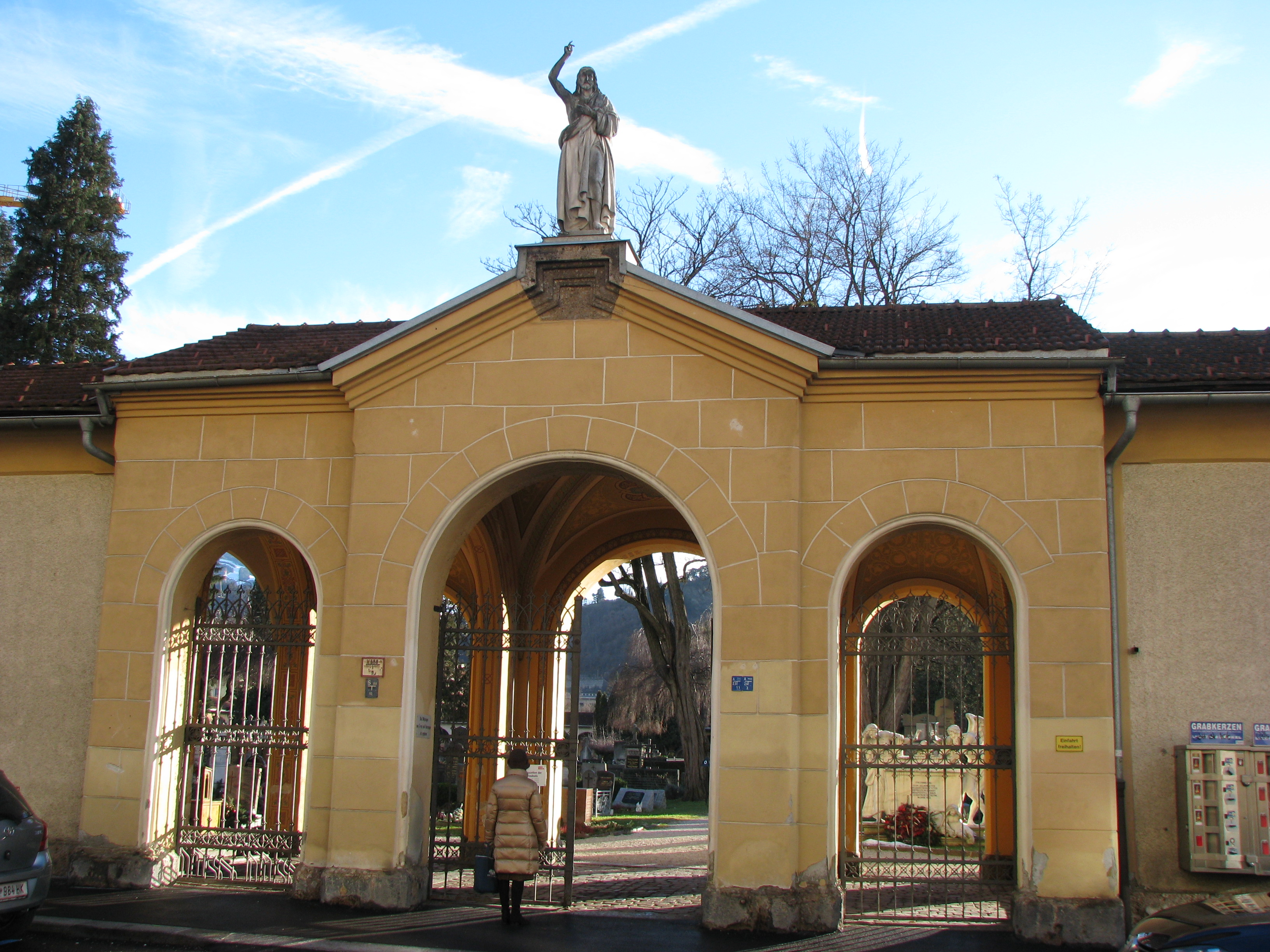 Westfriedhof Innsbruck, Nordeingang (Schöpfstraße)